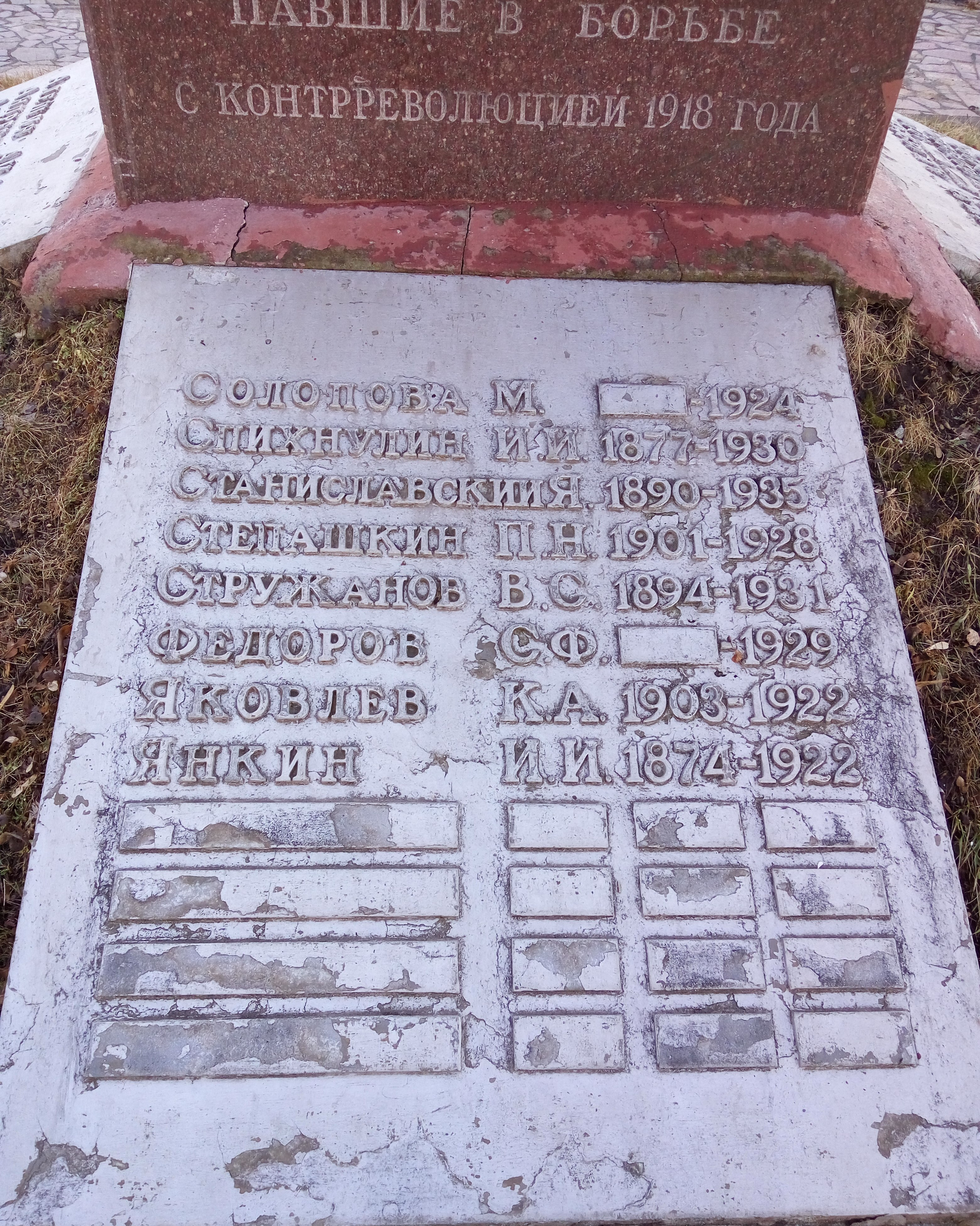 Стела героям гражданской войны 1917-1918 годов (Рязань), бронзовая плита с именами захороненных на Братском кладбище